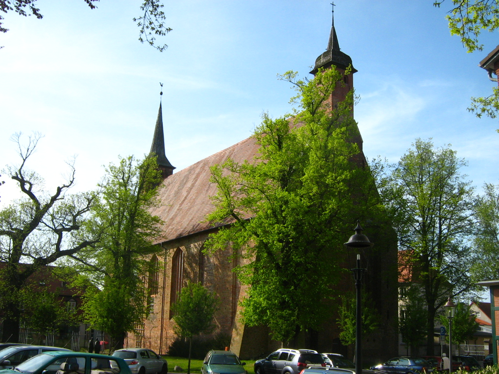 Die Kirche des ehemaligen Klarissenklosters in Ribnitz, heute Teil des Bernsteinmuseums (Ribnitz-Damgarten, Landkreis Nordvorpommern, Mecklenburg-Vorpommern).